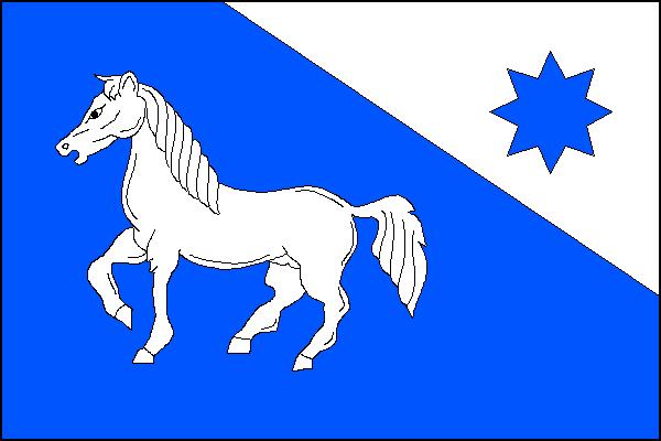 Vlajka obce Valšov